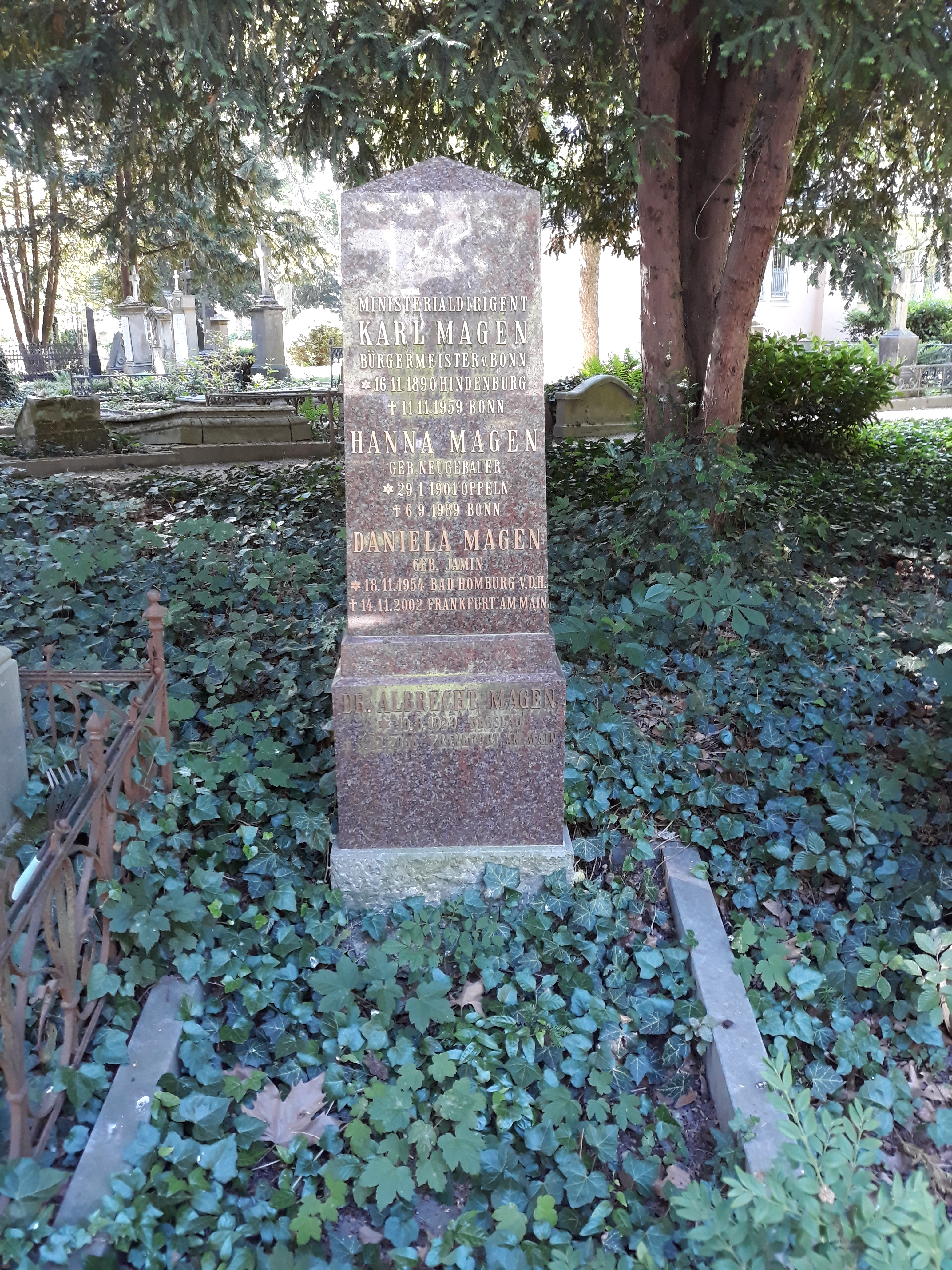 Das Grab des deutschen Politikers Albrecht Magen im Familiengrab auf dem Alten Friedhof Bonn.